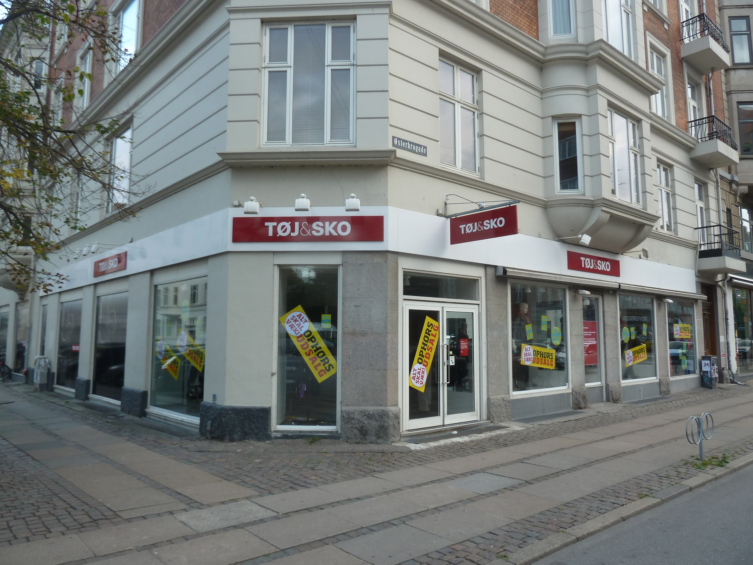 The shop Tøj & Sko on Østerbrogade in Østerbro in Copenhagen.